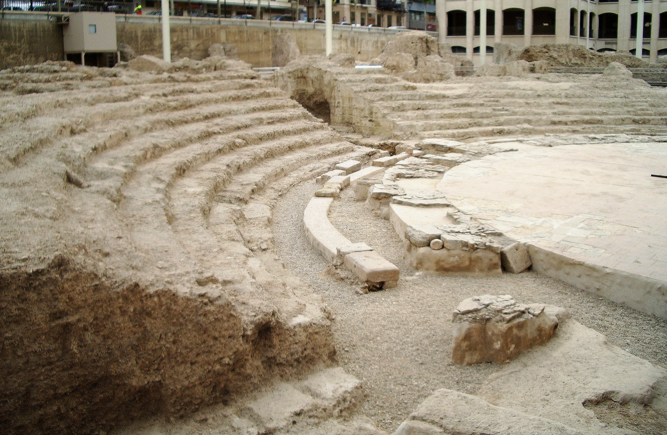 Teatro Romano Cesaraugusta 2